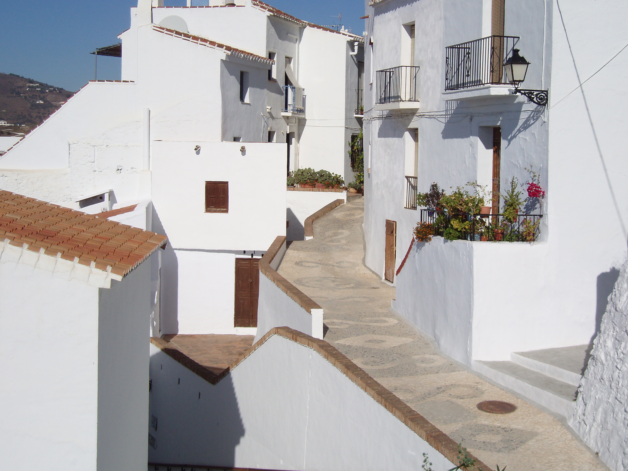 Impressions of Frigiliana (Málaga) in Andalucía, (España)